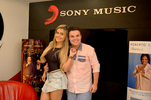 Assinatura de contrato com a gravadora em janeiro de 2015